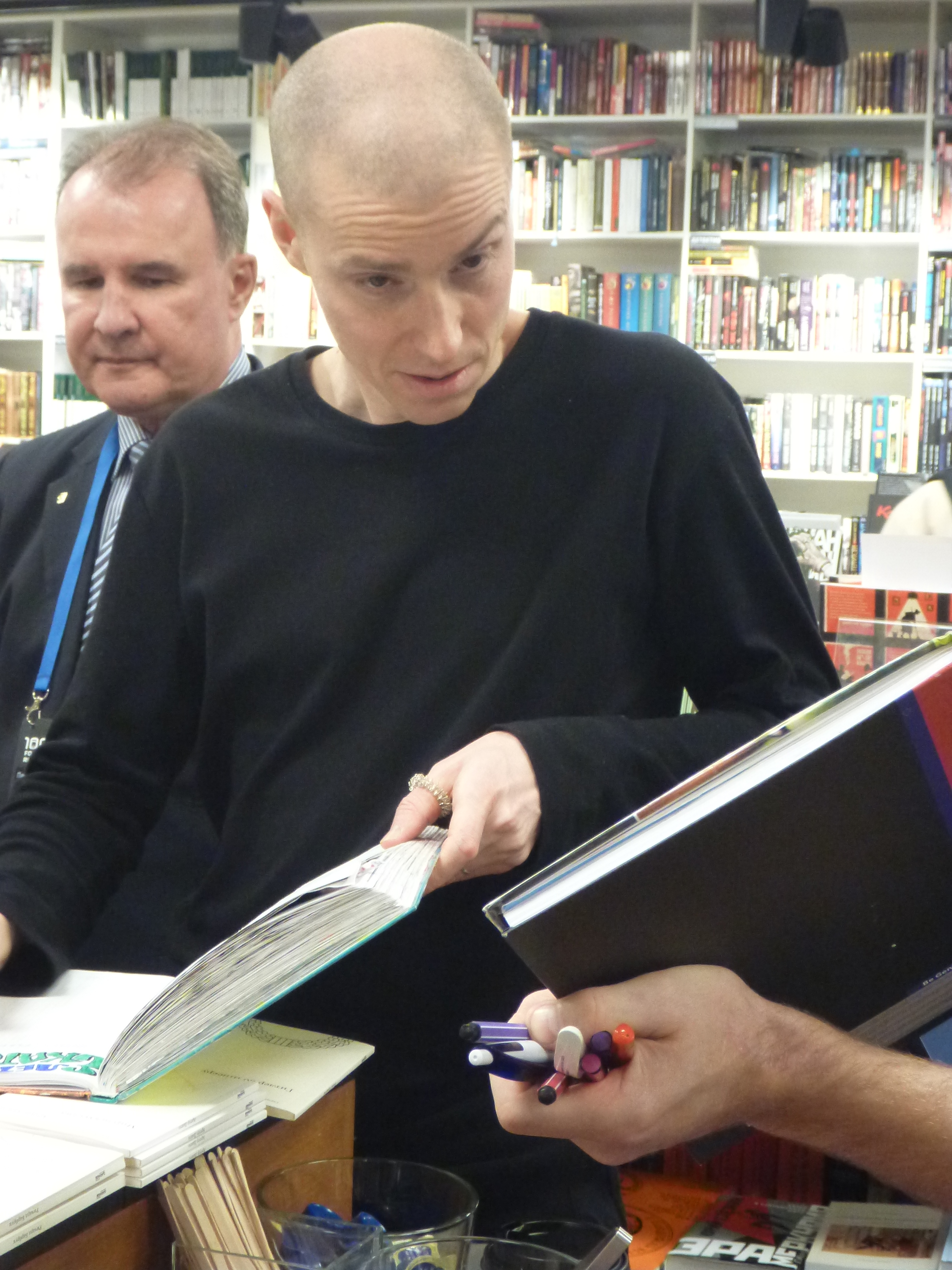 Архитектор Борис Бернаскони в Ельцин-центре, 29 октября 2019 года